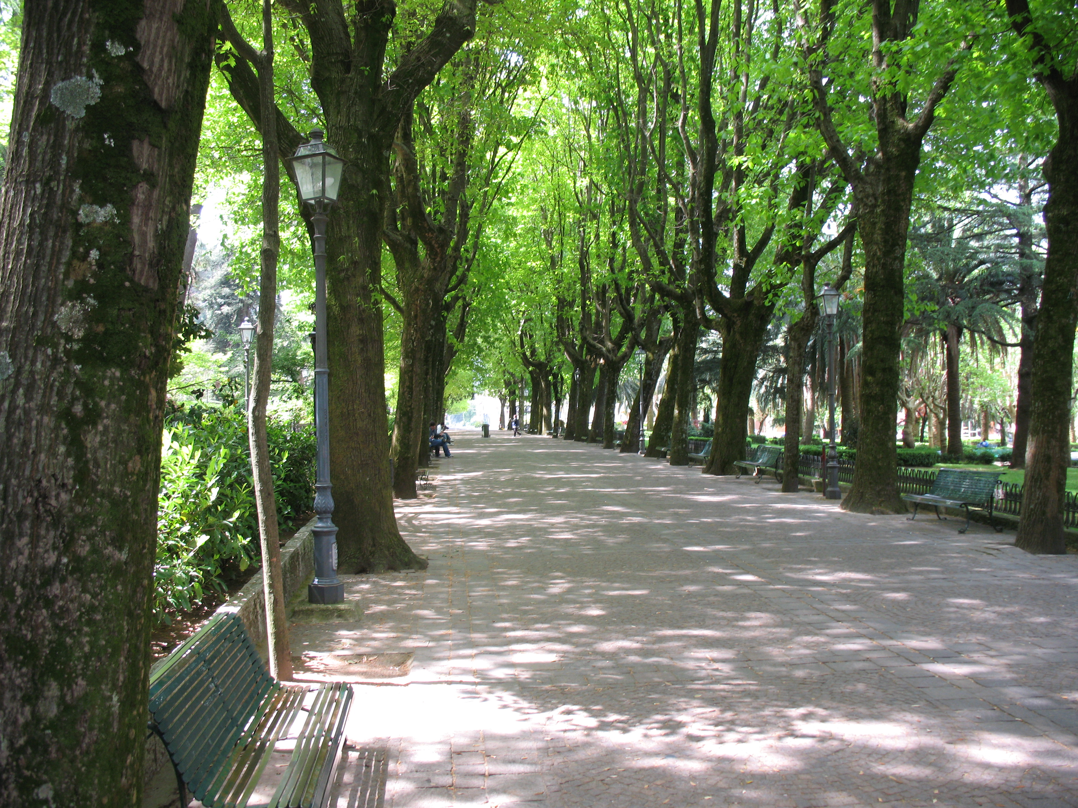 Foto della villa comunale di Cittanova (RC), Italy